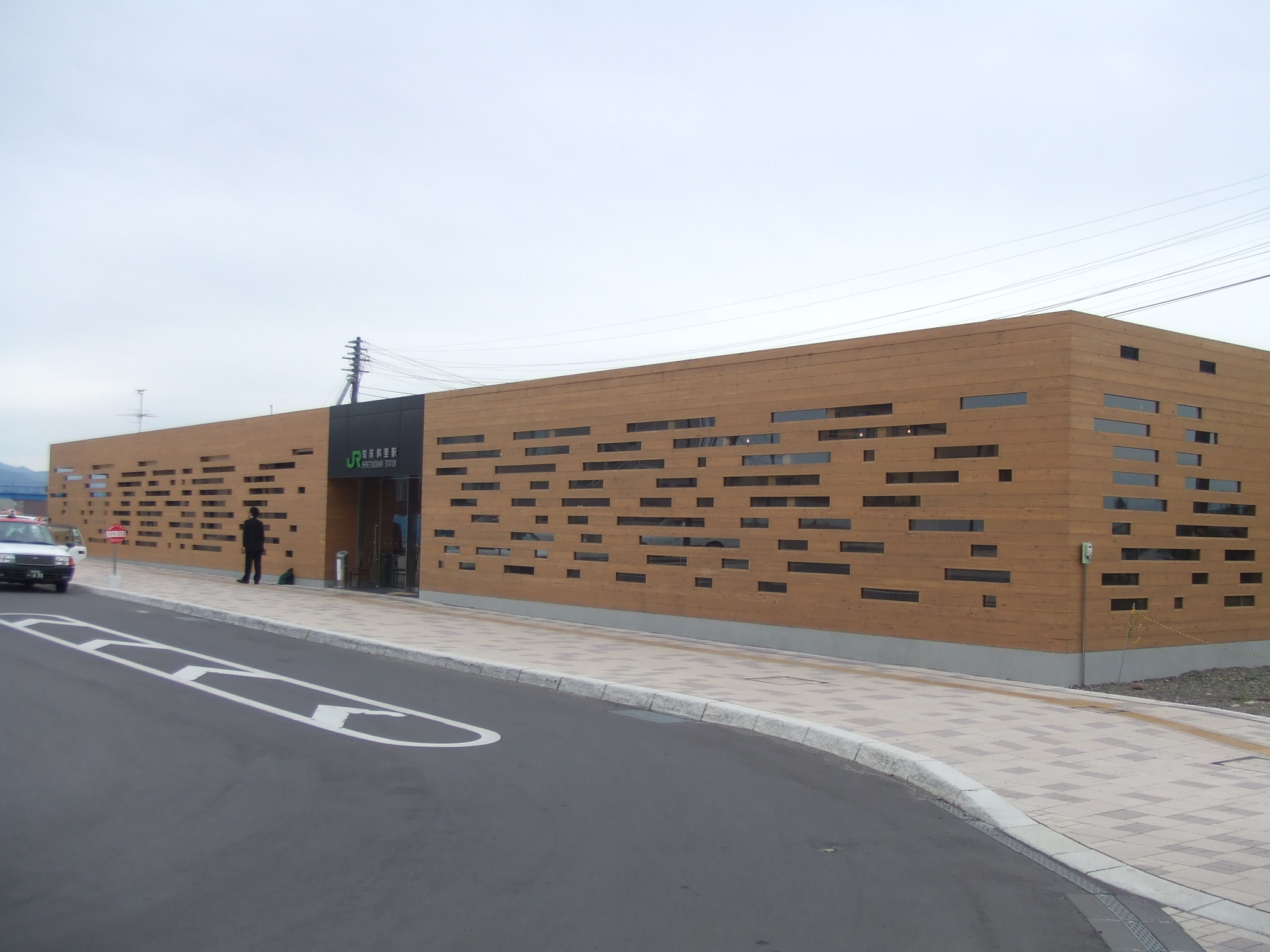 知床斜里駅 駅前の様子